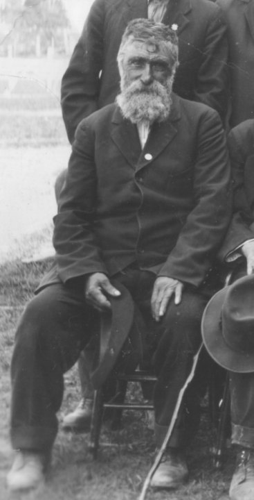 Joseph Chiasson, accusé puis acquitté du meurtre de John Gifford, en 1875.